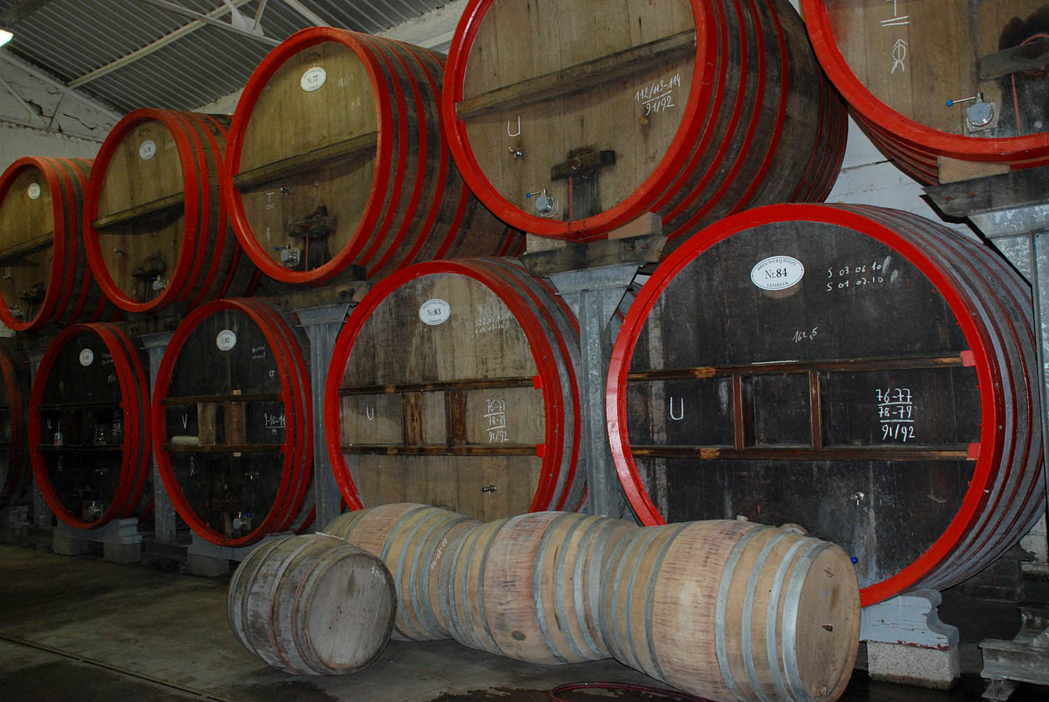 Brouwerij Boon vatenmagazijn